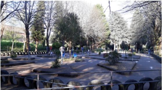 Circuito de educación vial con señais